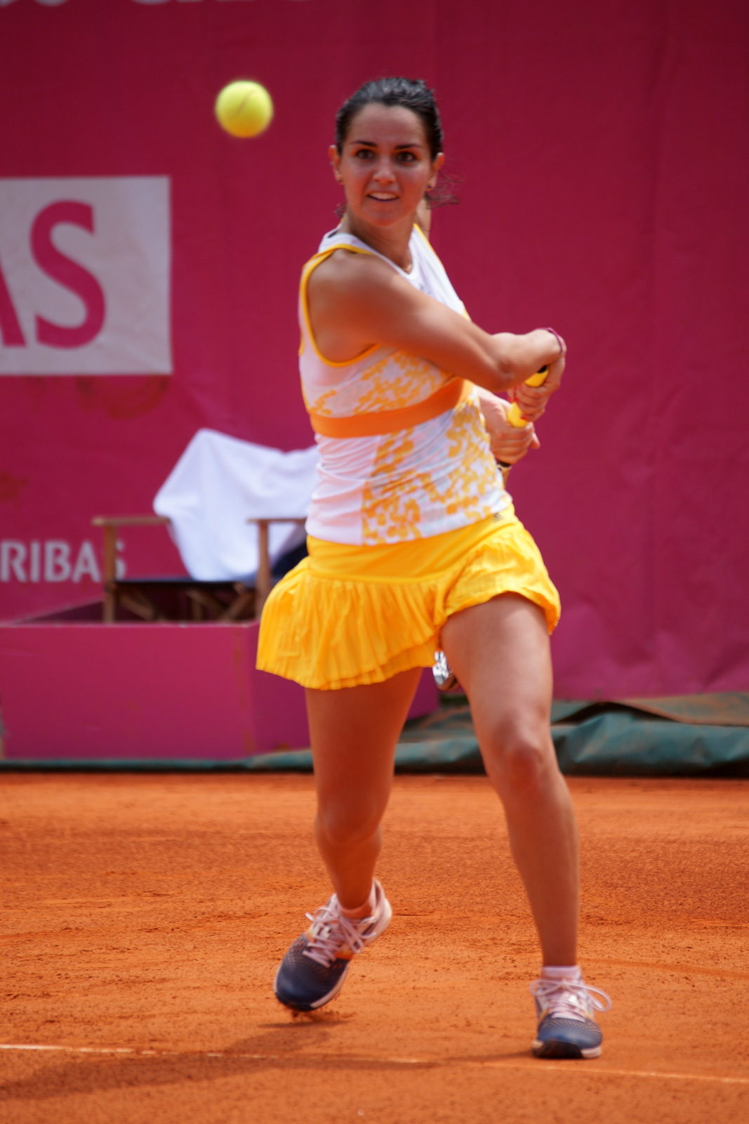 Amandine Hesse, Open ITF Cagnes-sur-Mer 2014